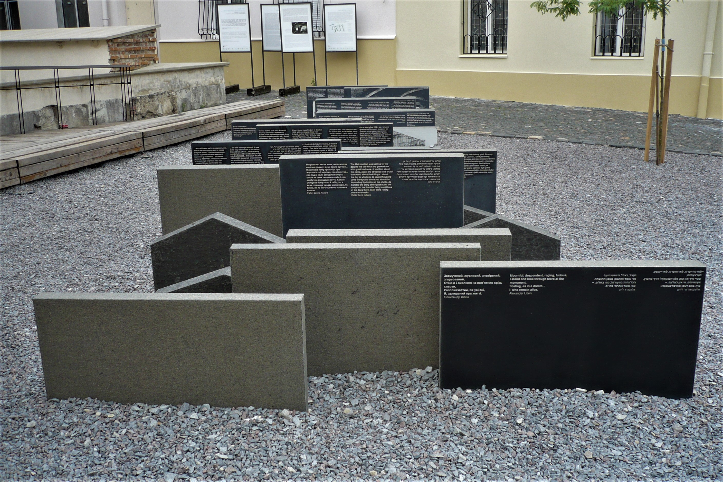 Synagoga Złota Róża we Lwowie. Pomnik